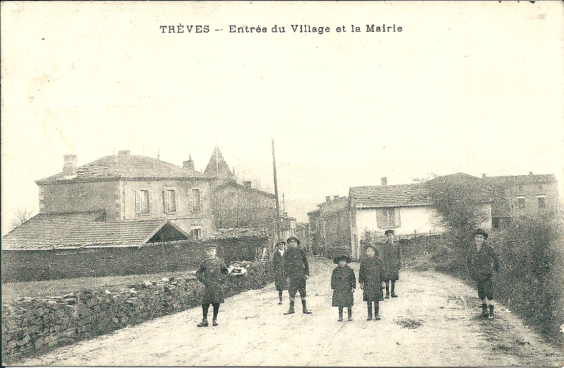 Trèves (Rhône) - Entrée du village & Mairie - avant 1939 (date d'envoi postal de la carte)